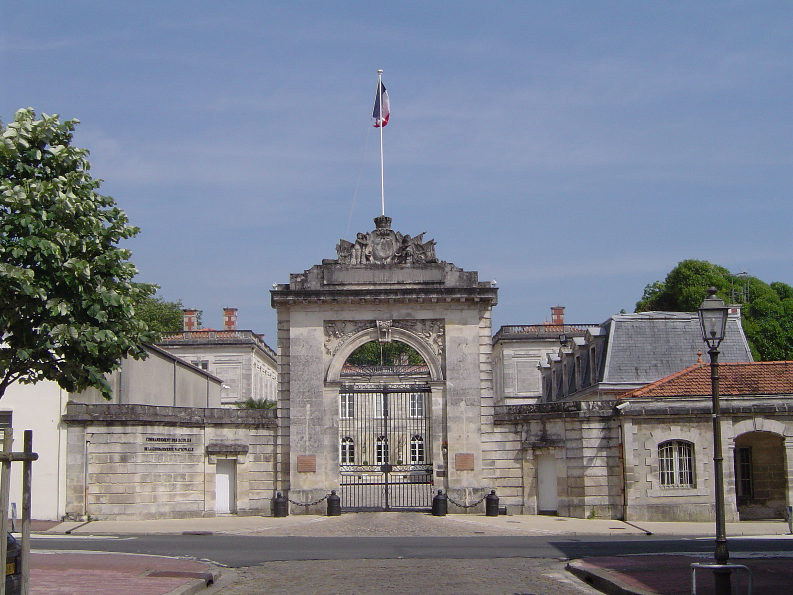 Préfecture maritime - Rochefort